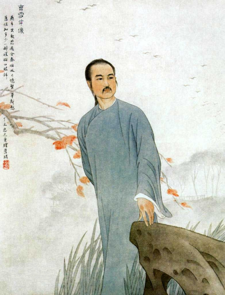 ผู้ประพันธ์ เฉาเสวี่ยฉิน (ค.ศ.1715 - 1763)